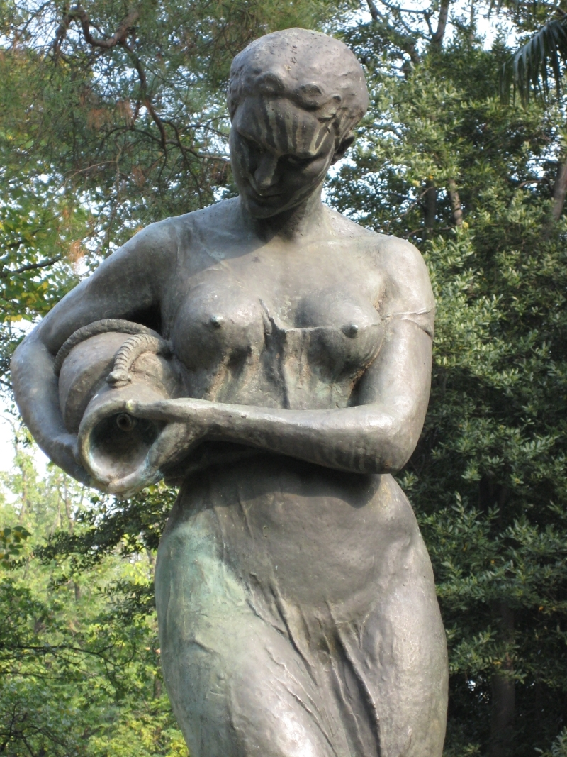 Hygia, 1955. - 1956. g., bronca, skulptura Zvonka Cara, Rijeka